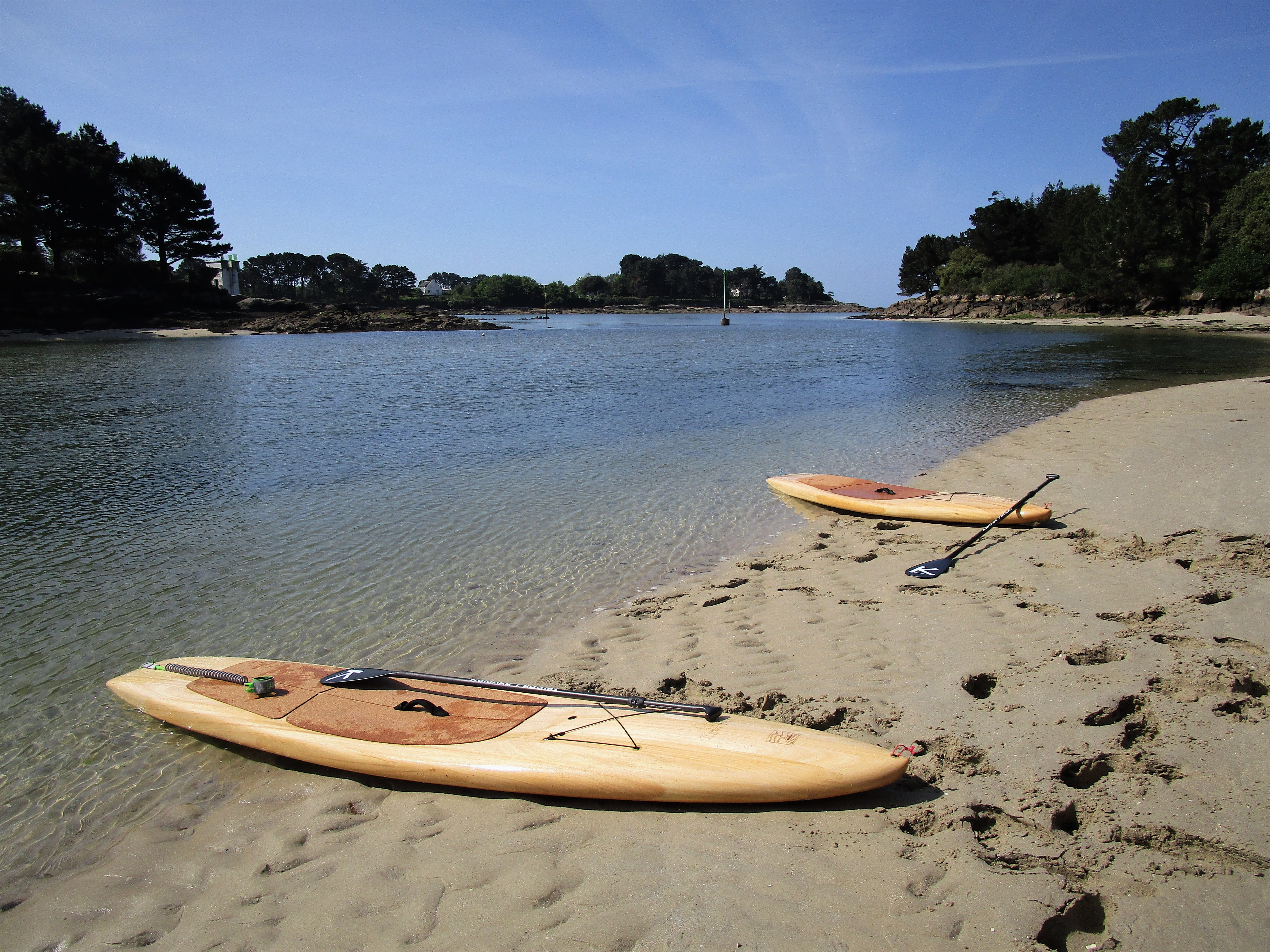 planche à rame bois